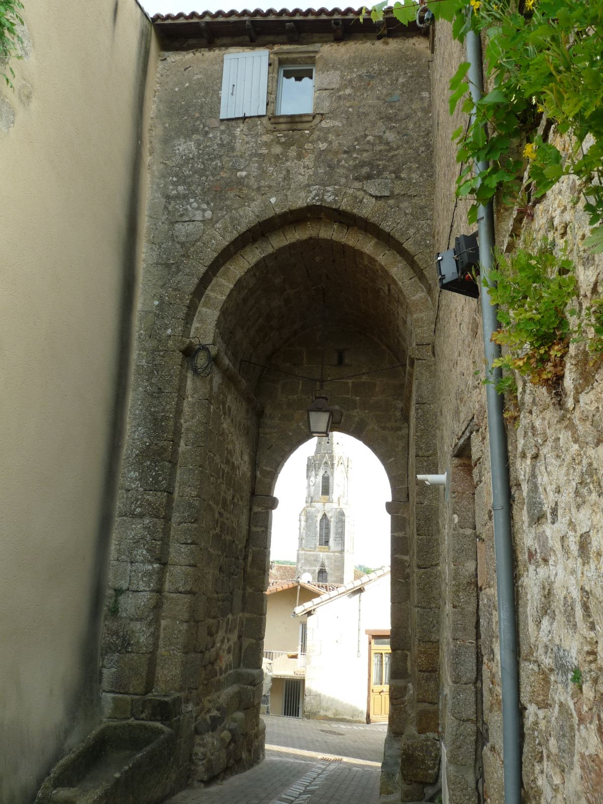 ancien rempart, Confolens (Charente, France)